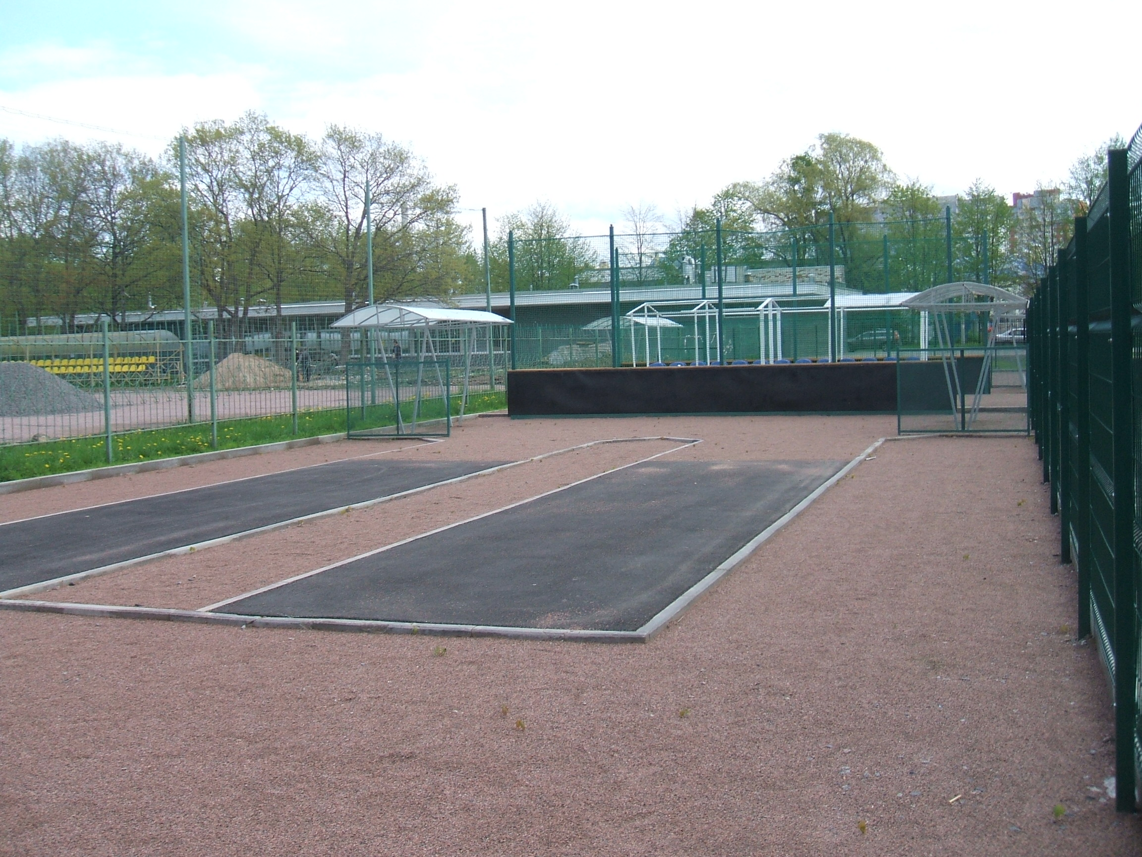 Сестрорецк Дубки площадка для игры в городки